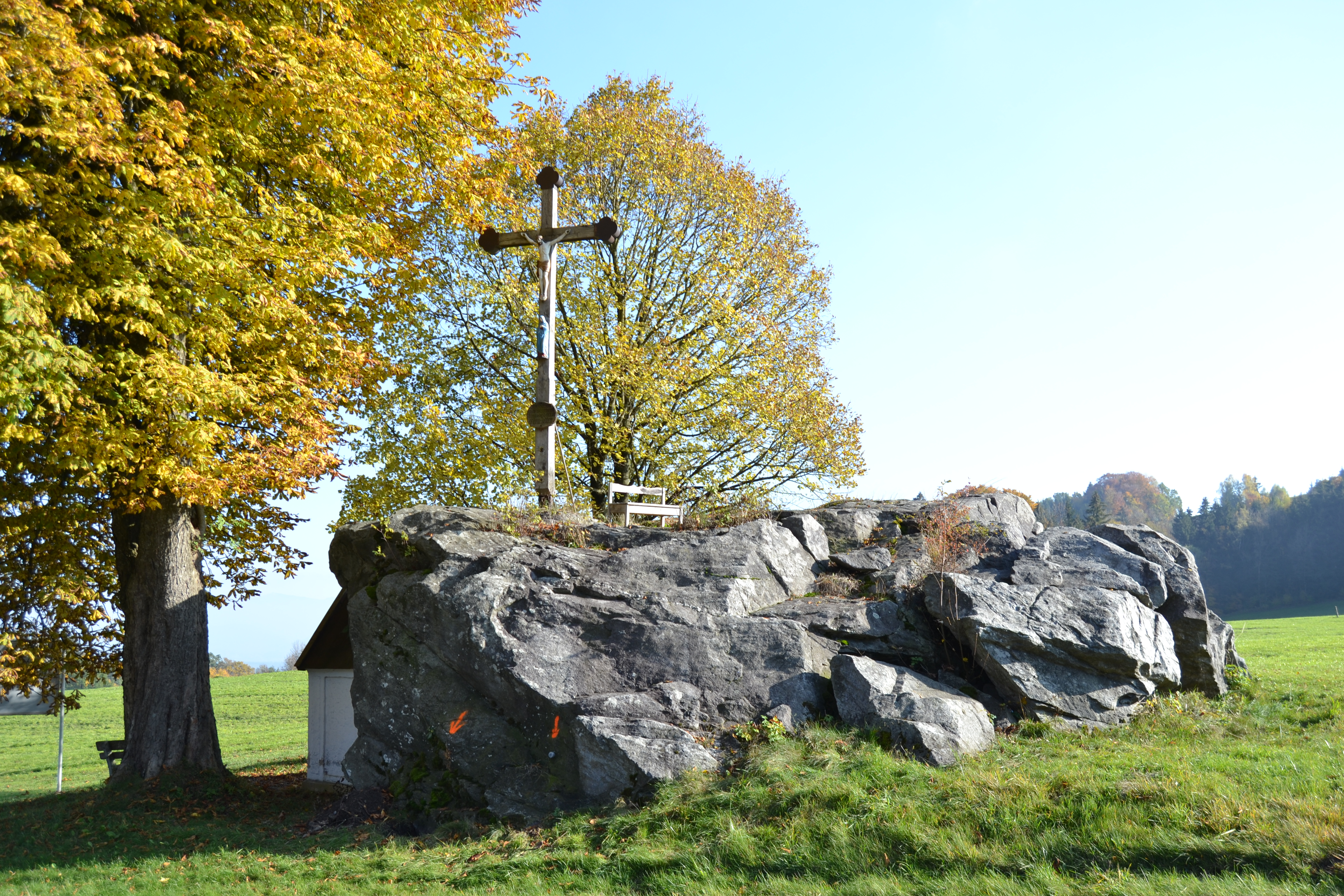 Großer Stein von Nordwesten